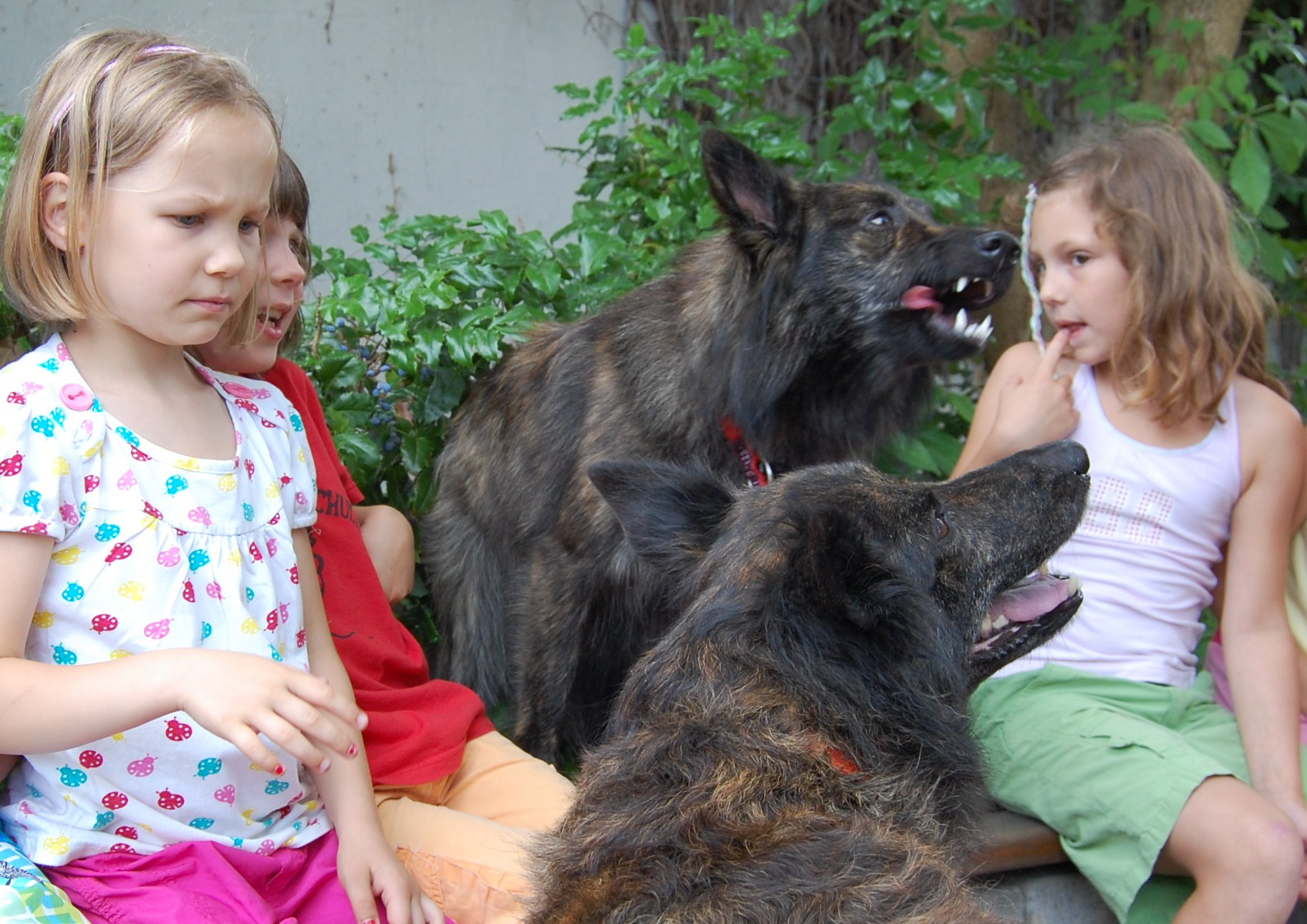 Hollandse Herdershond - Holländische Langhaar-Schäferhunde mit Mädchen